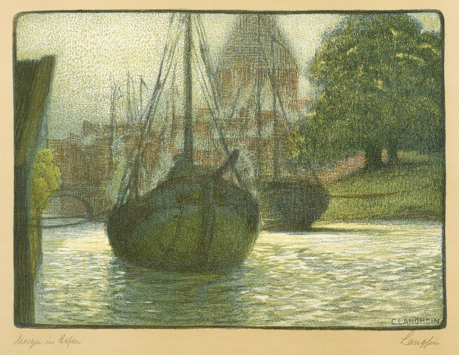 Carl Langhein: Morgen im Hafen, Lithografie, 1901 oder früher. Aufgeführt im Katalog von 1904. Gedruckt in der Kunstdruckerei Künstlerbund Karlsruhe